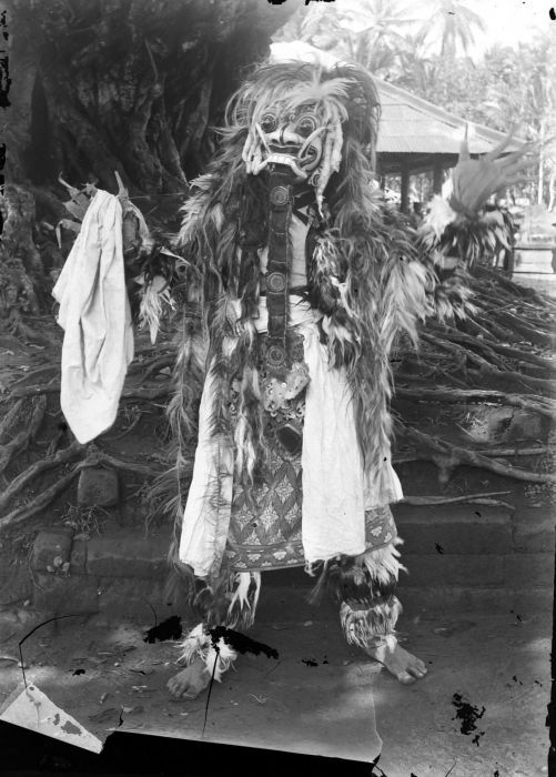 Negatief. Portret van Rangda, de heksweduwe